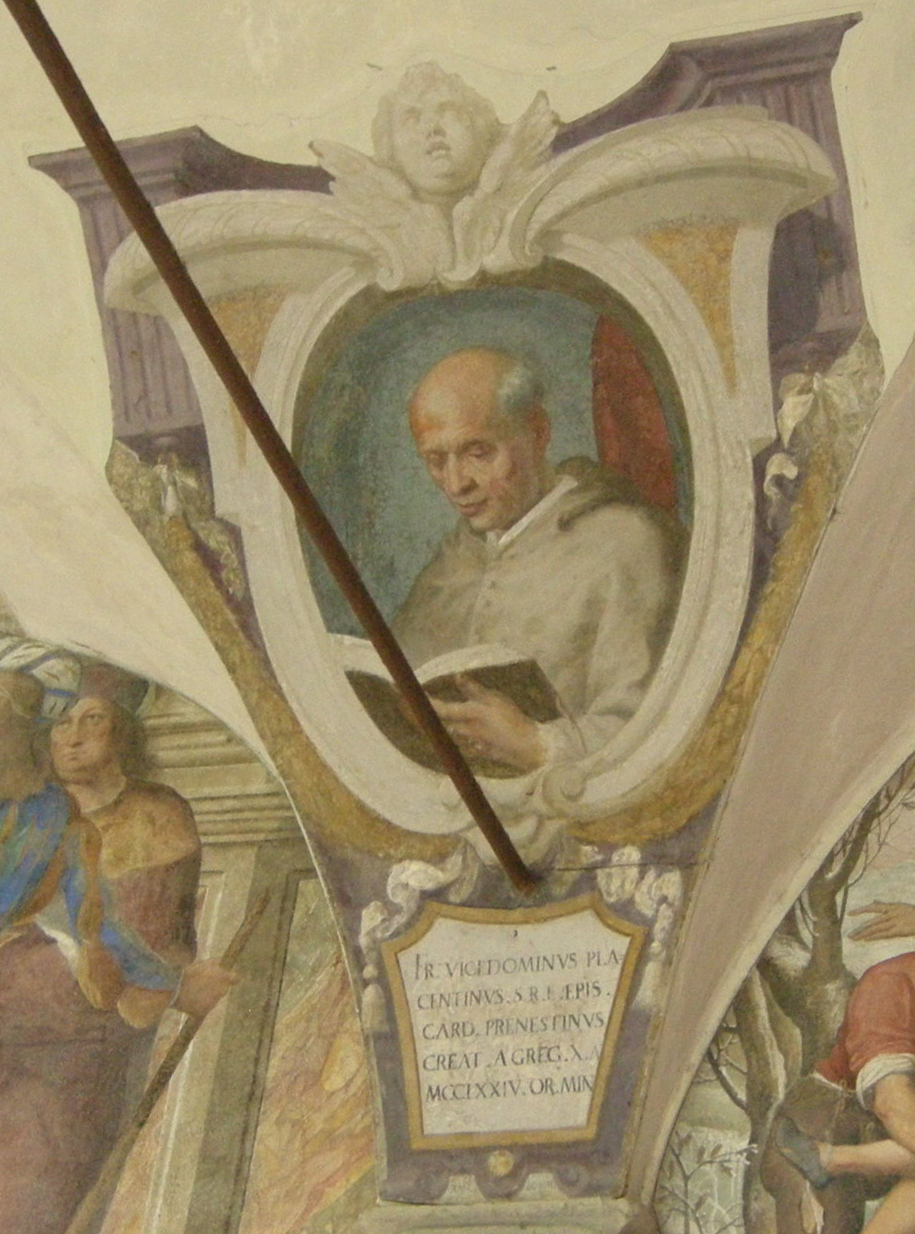 Chiostro di ognissanti, personalità francescane 06 Vicedomino Vicedomini